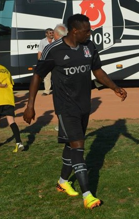 Michael Eneramo 8 Eylül ( 8.09.2013 ) 'te oynanan dostluk maçında ilimiz takımlarından fıtıprafçılığını yaptığım Tekirdağspor maçında